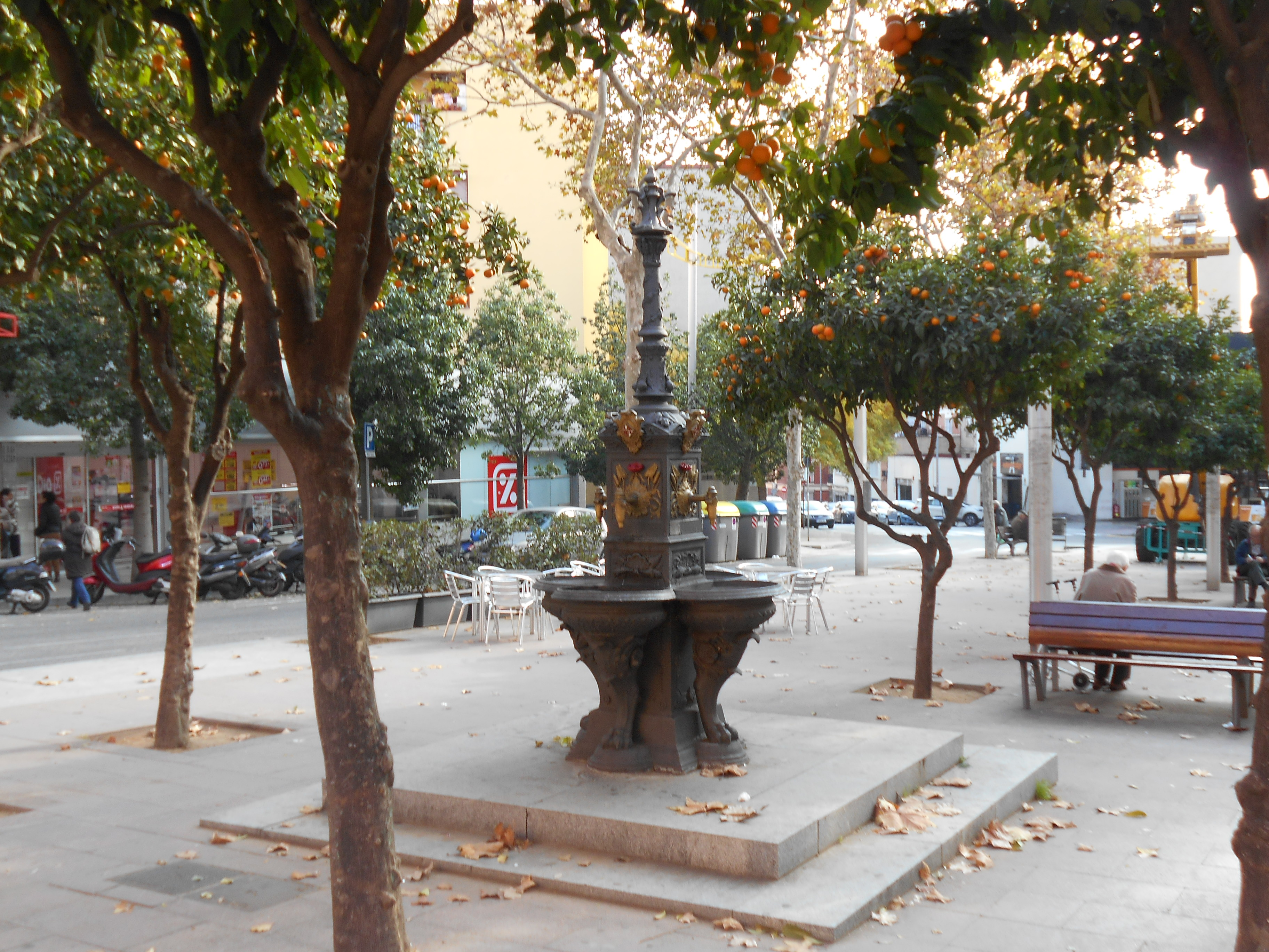 Fuente de la plaza de las Madres de la Plaza de Mayo.